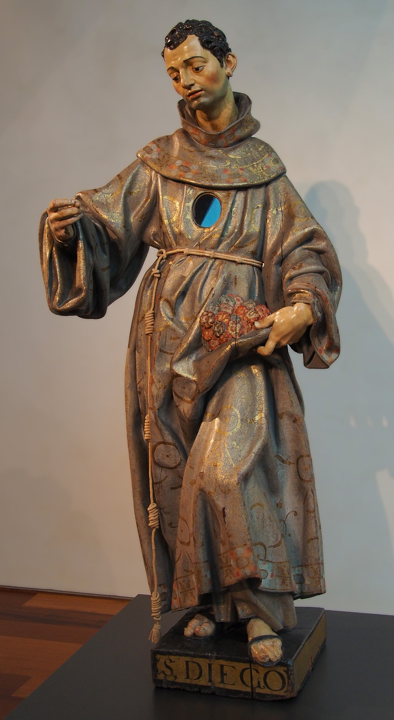 San Diego de Alcalá, c. 1605, por Gregorio Fernández (1576-1636). Museo Nacional de Escultura, Valladolid.